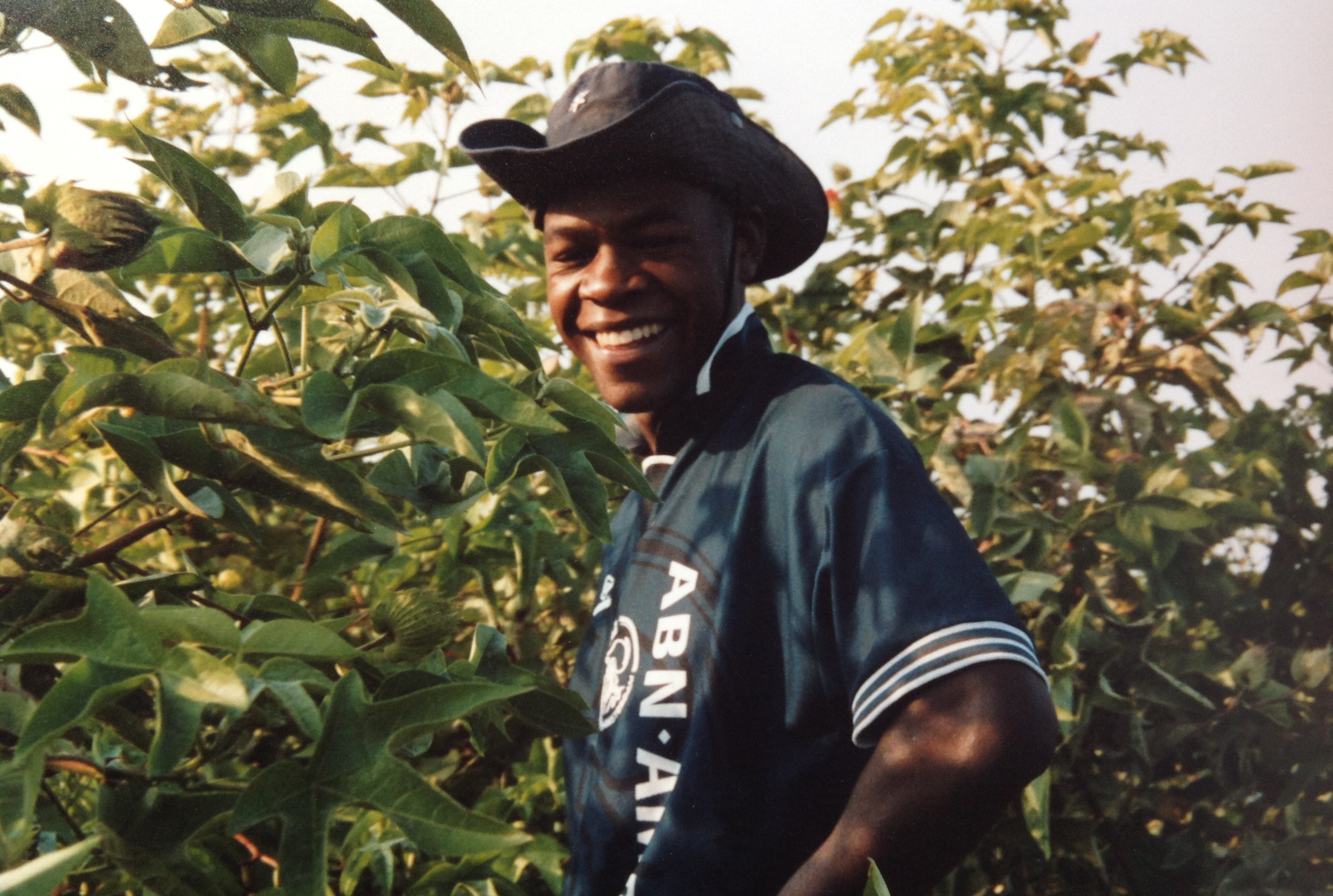 Récolte du coton à El Carmen - Chincha - Pérou - Prise de vue effectuée durant le tournage du Documentaire "Negra"